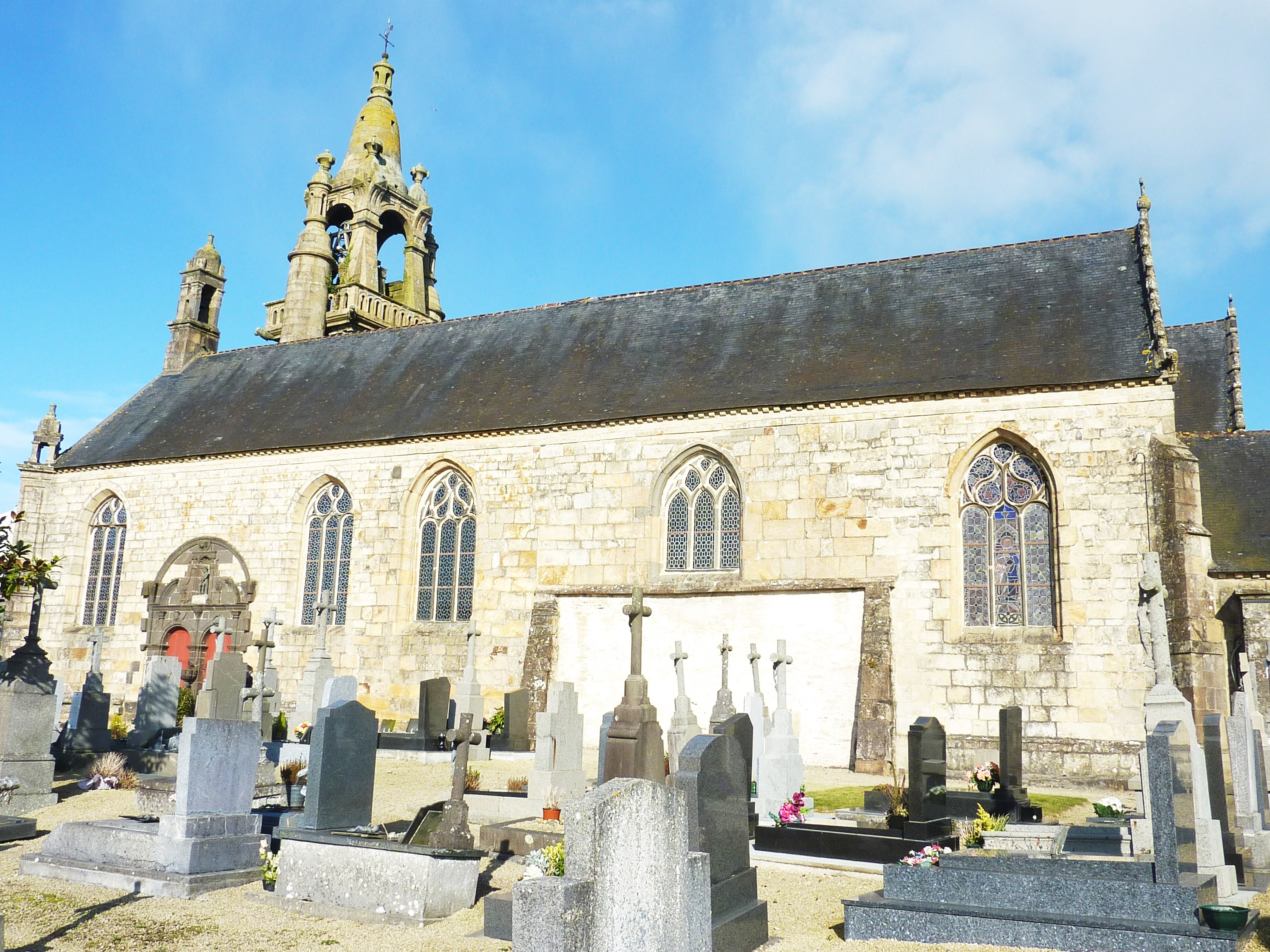 Irvillac : l'église paroissiale Saint-Pierre, vue d'ensemble depuis le sud